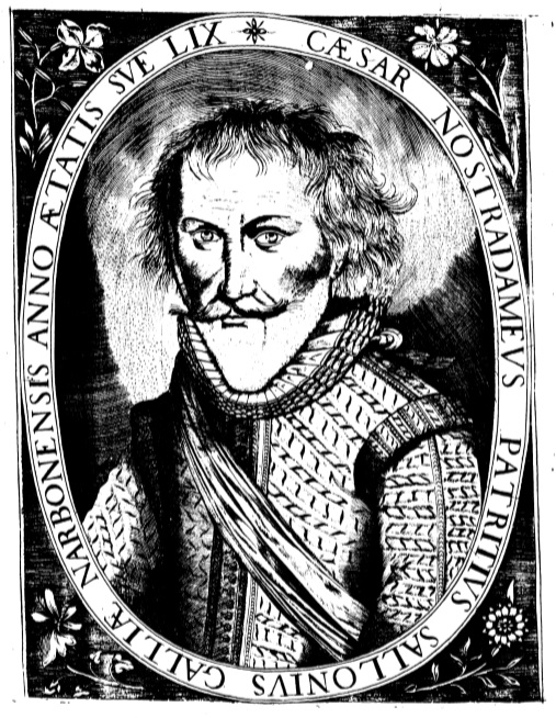 Ritratto dello scrittore e pittore César de Notre-Dame, figlio di Nostradamus